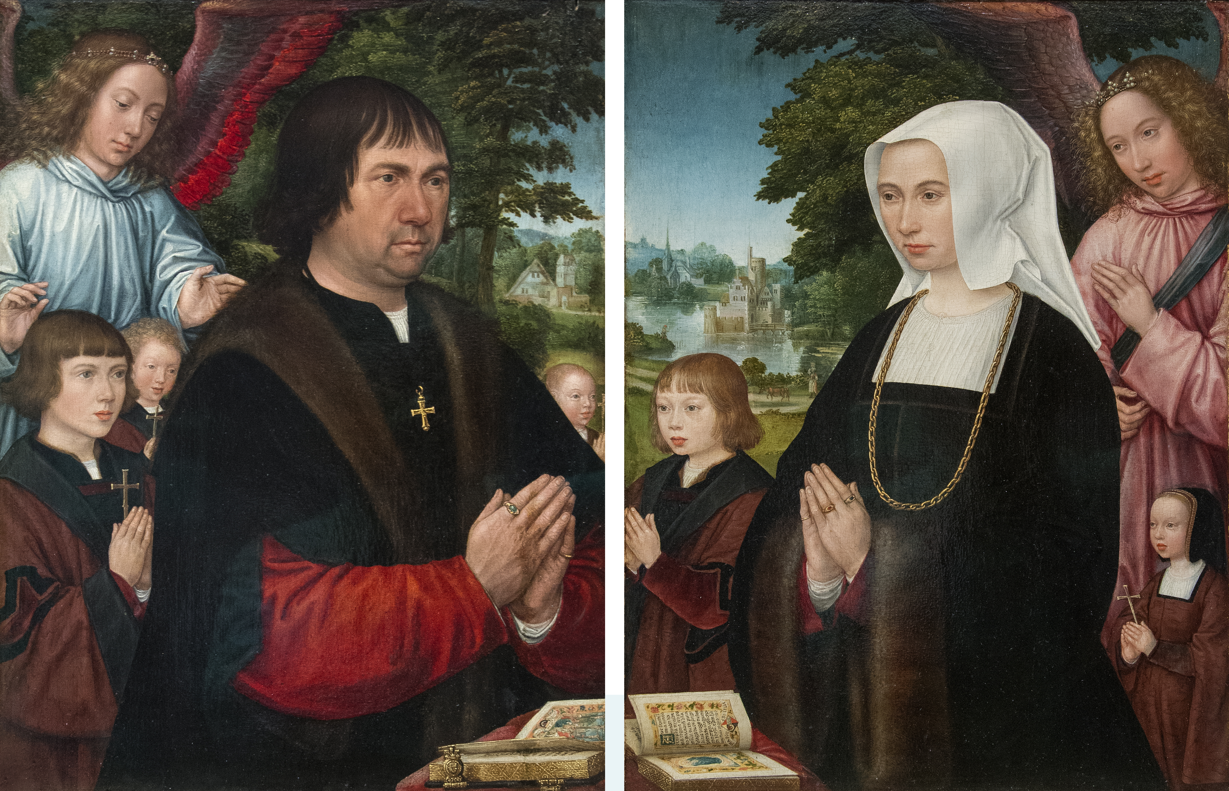 Eigen creatie van twee schilderijen - Gerard Horenbout (ca.1465-1540of1541) Portretten van Lieven van Pottelsberghe, Livina van Steelant en hun kinderen MSK Gent This is a file created at the museum: Museum of Fine Arts in Ghent Wikidata has entry Q26250180 with data related to this item.